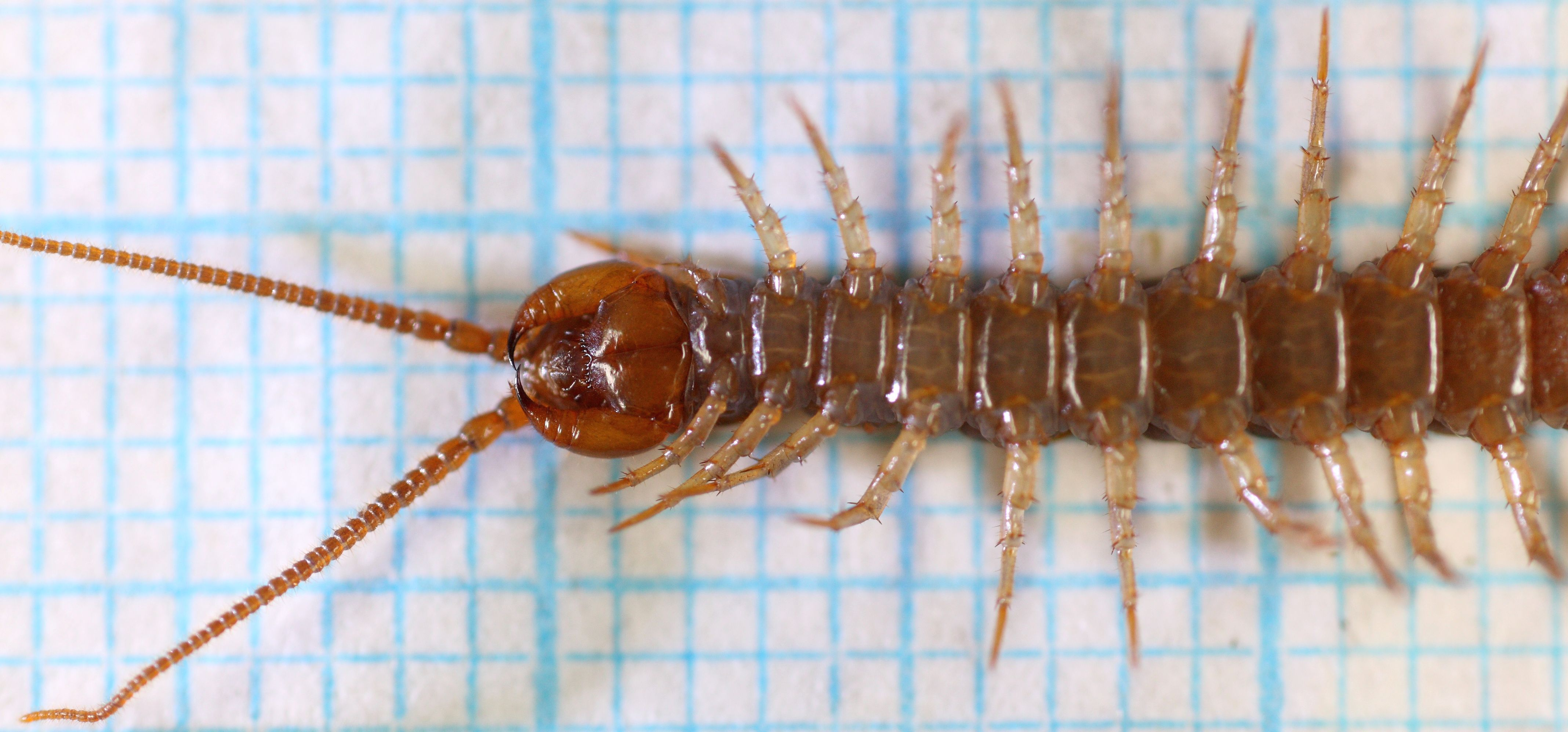 Underside av storsteinkryper Lithobius forficatus